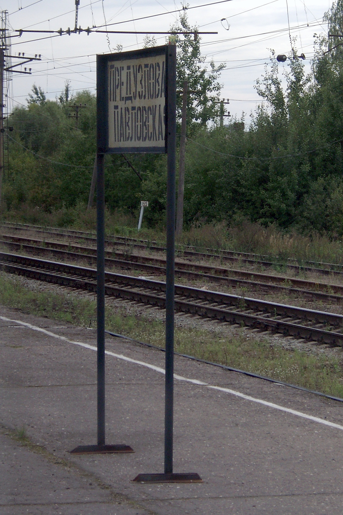 Железнодорожная станция Предузловая-Павловская, Новгородская область, Россия. Указатель с названием